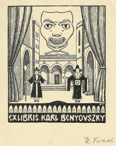 Exlibris von Karl Benyovszky